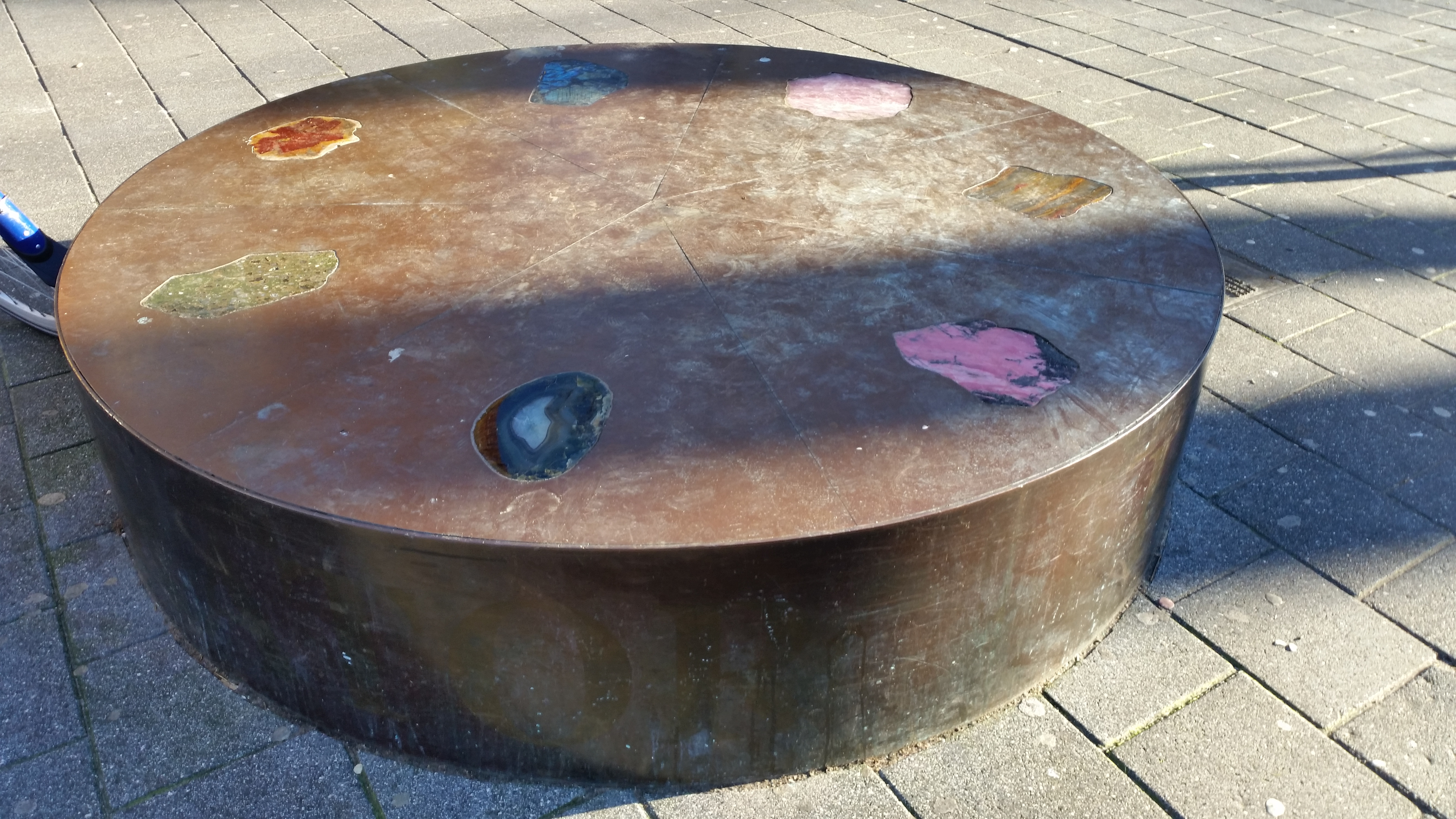 The Regenerator